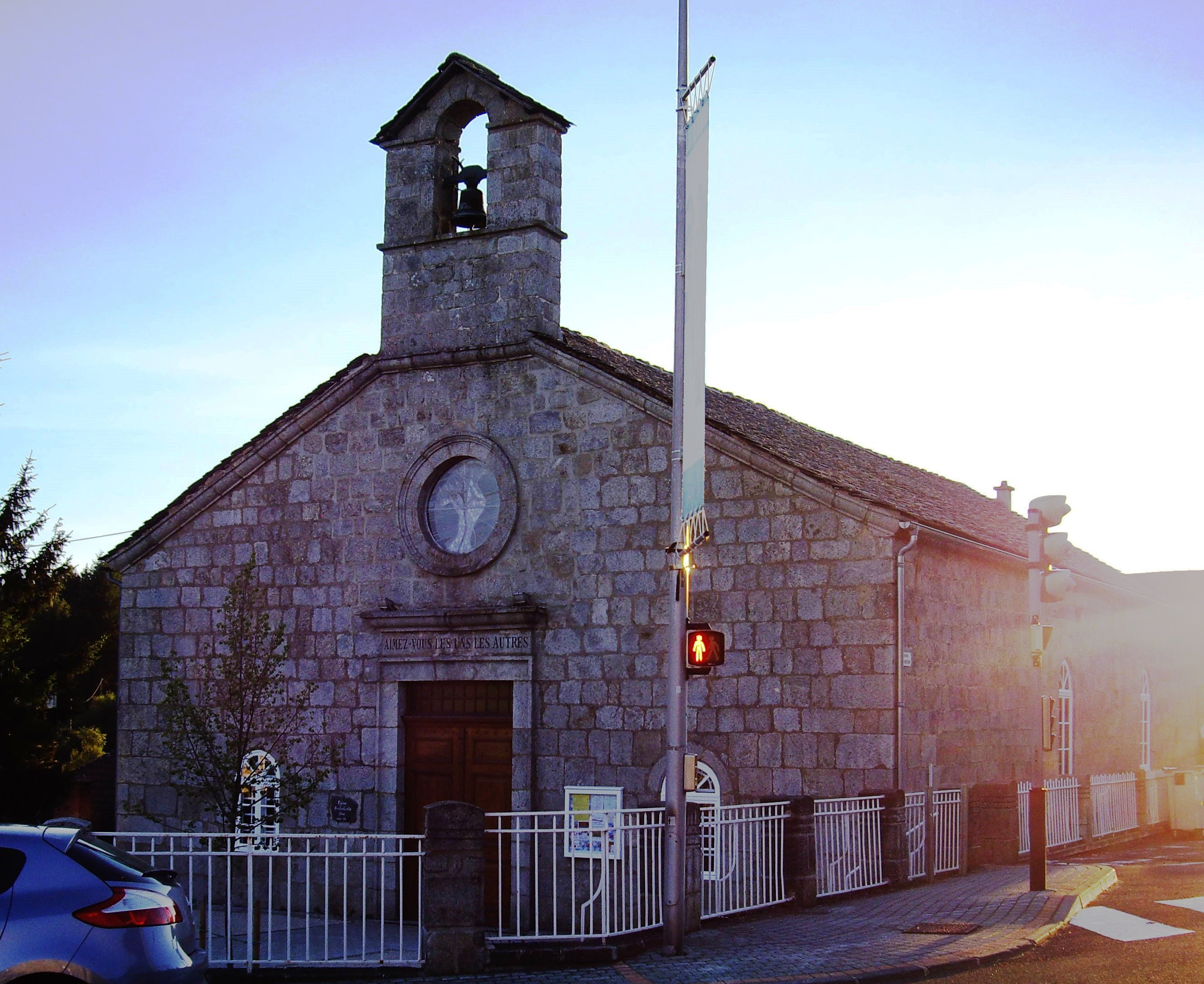 This protestant church is where pastor André Trocmé called for non-violent resistance to Nazism in June 1940. It is located in Haute-Loire, France.